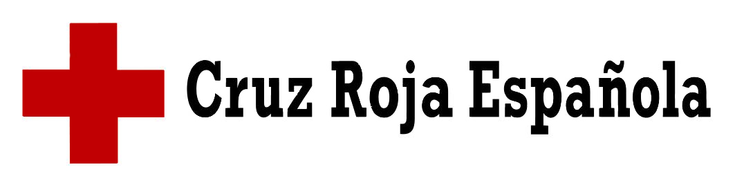 Logotipo de Cruz Roja Española